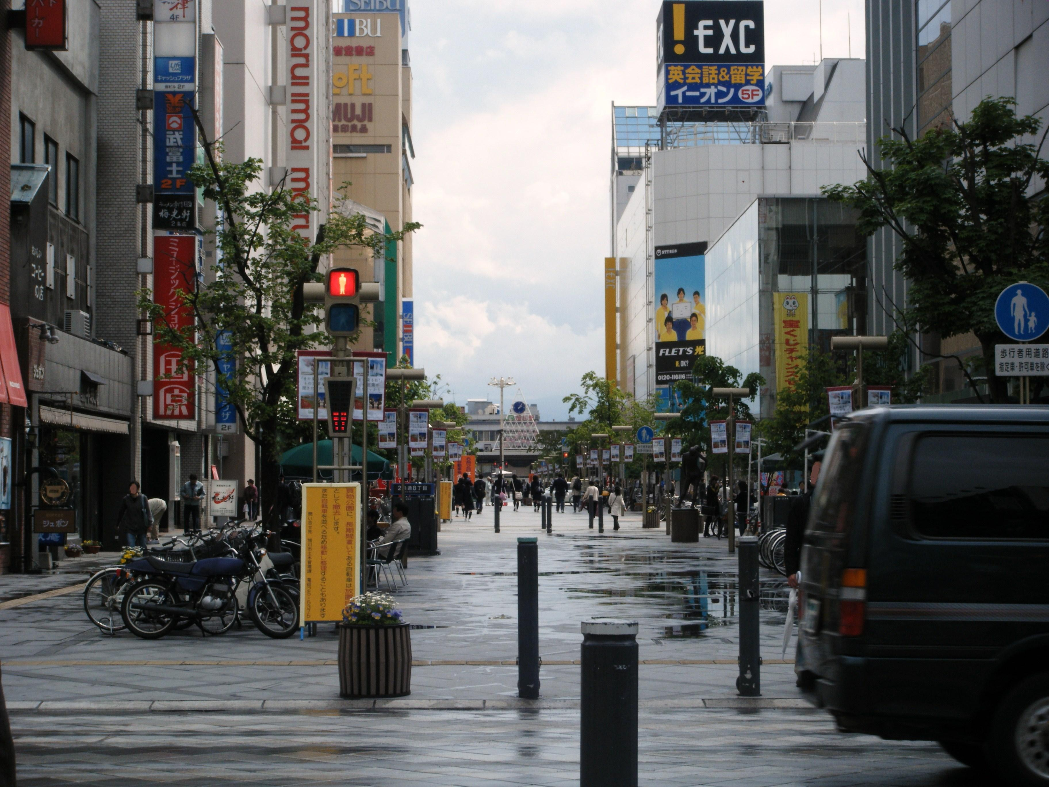 北海道旭川市：平和通買物公園（日本初の歩行者天国）